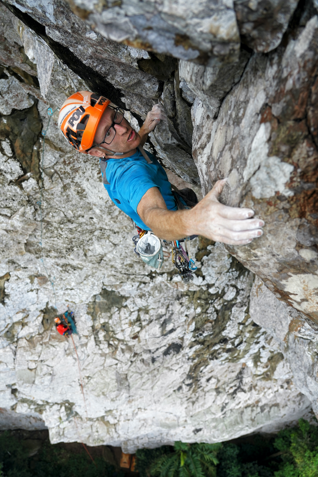 ©Jordi Canyi